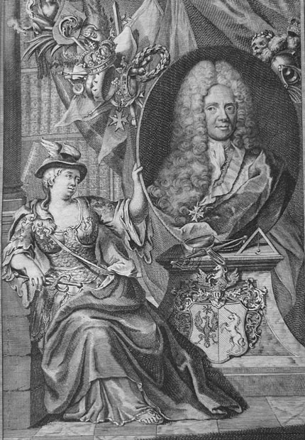 Frontispiz zu Bessers Schriften von 1732 Unter dem Bild das Wappen des Johann von Besser aus dem Adelsbrief von 1690 mit dem brandenburgischen Kuradler (rot) auf weißem Grund und einem Einhorn (weiß) auf blauem Grund, das Wappentier aus der Familie seiner Frau.